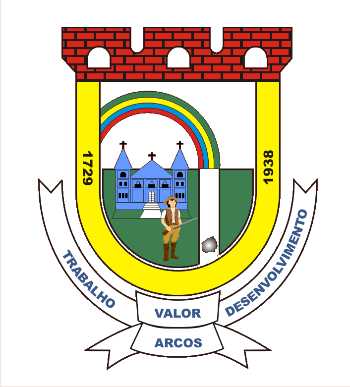 Brasão oficial de Arcos - MG